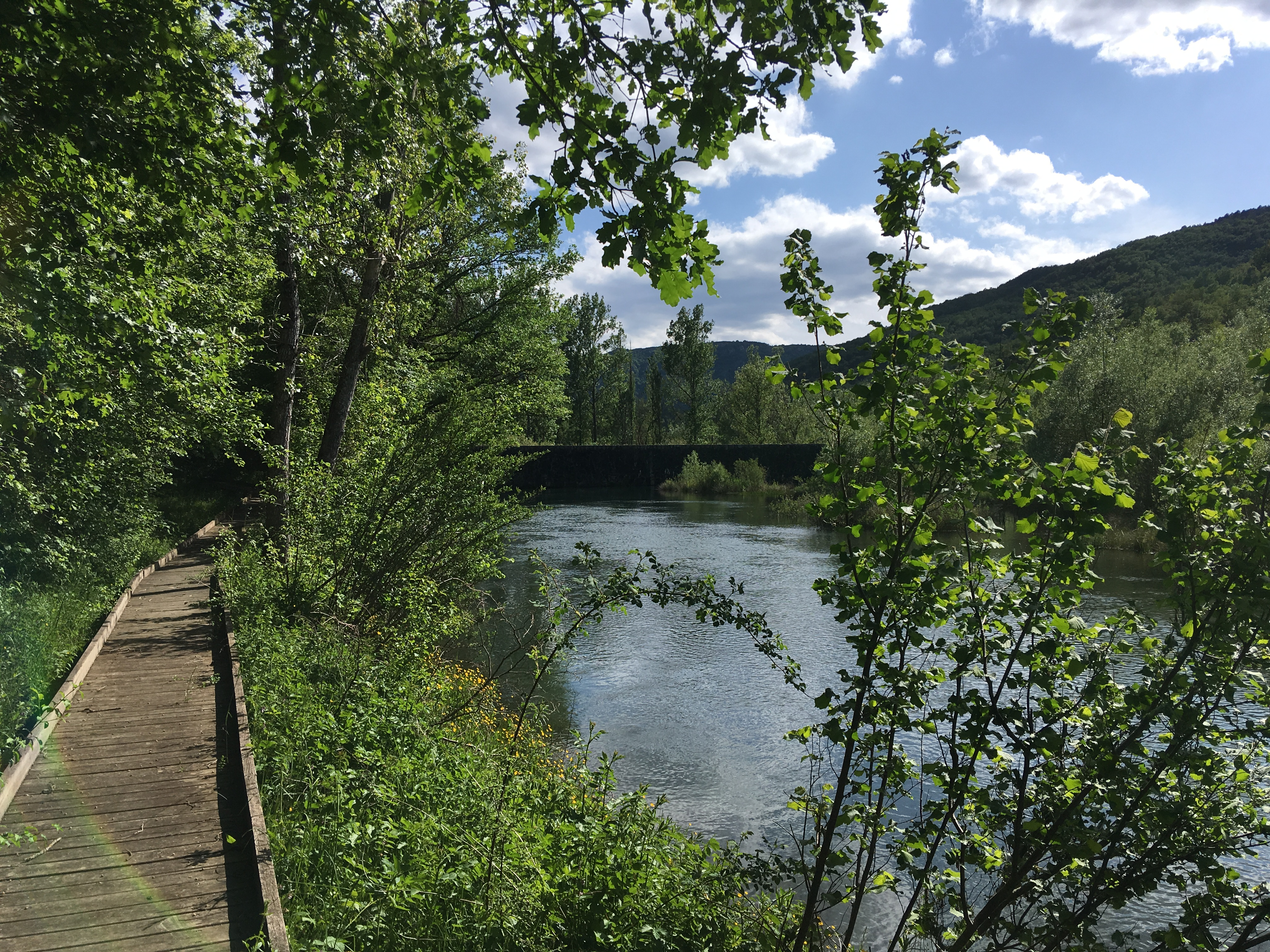 Passarel·la